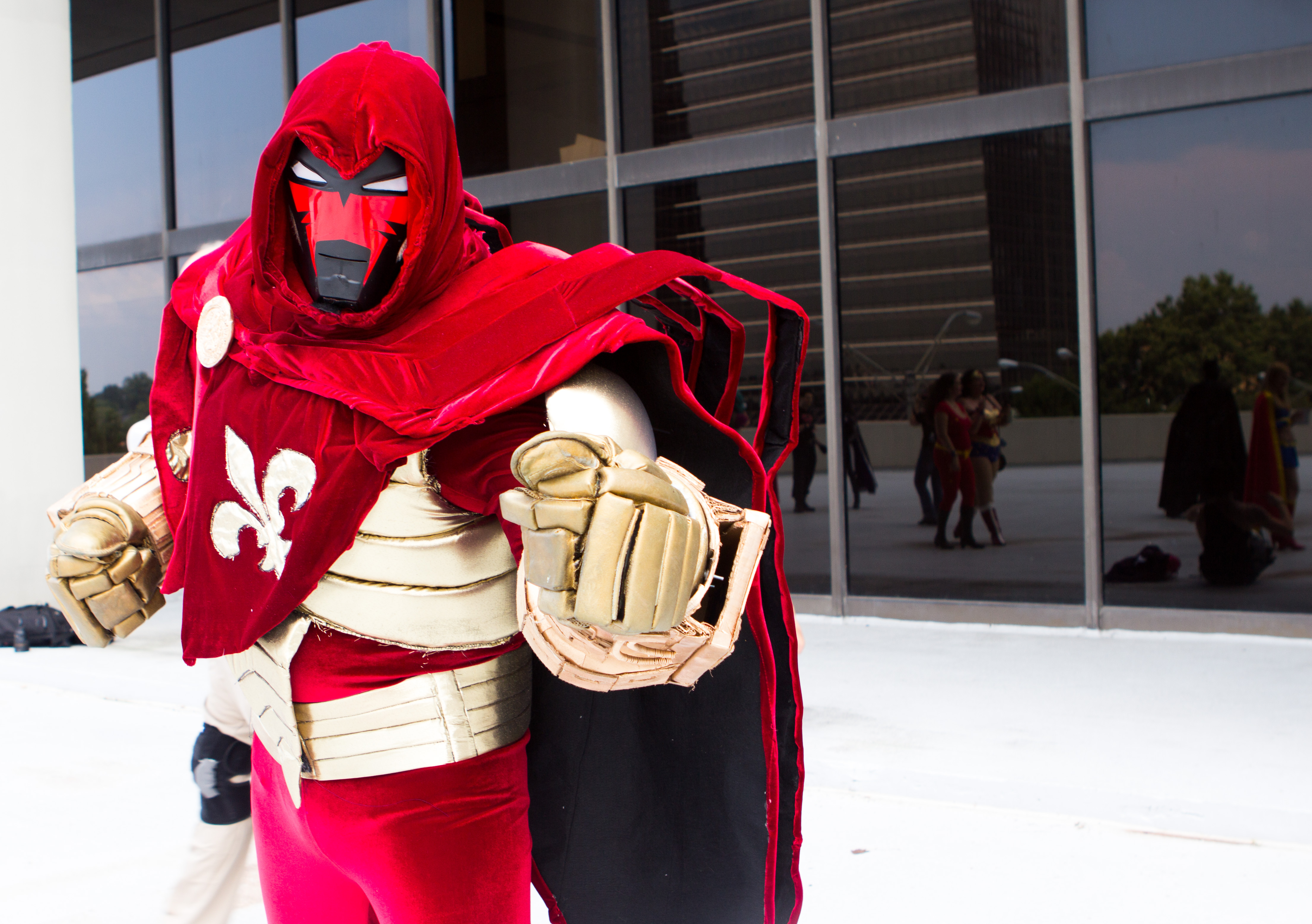 Cosplay at Dragon*Con 2013.